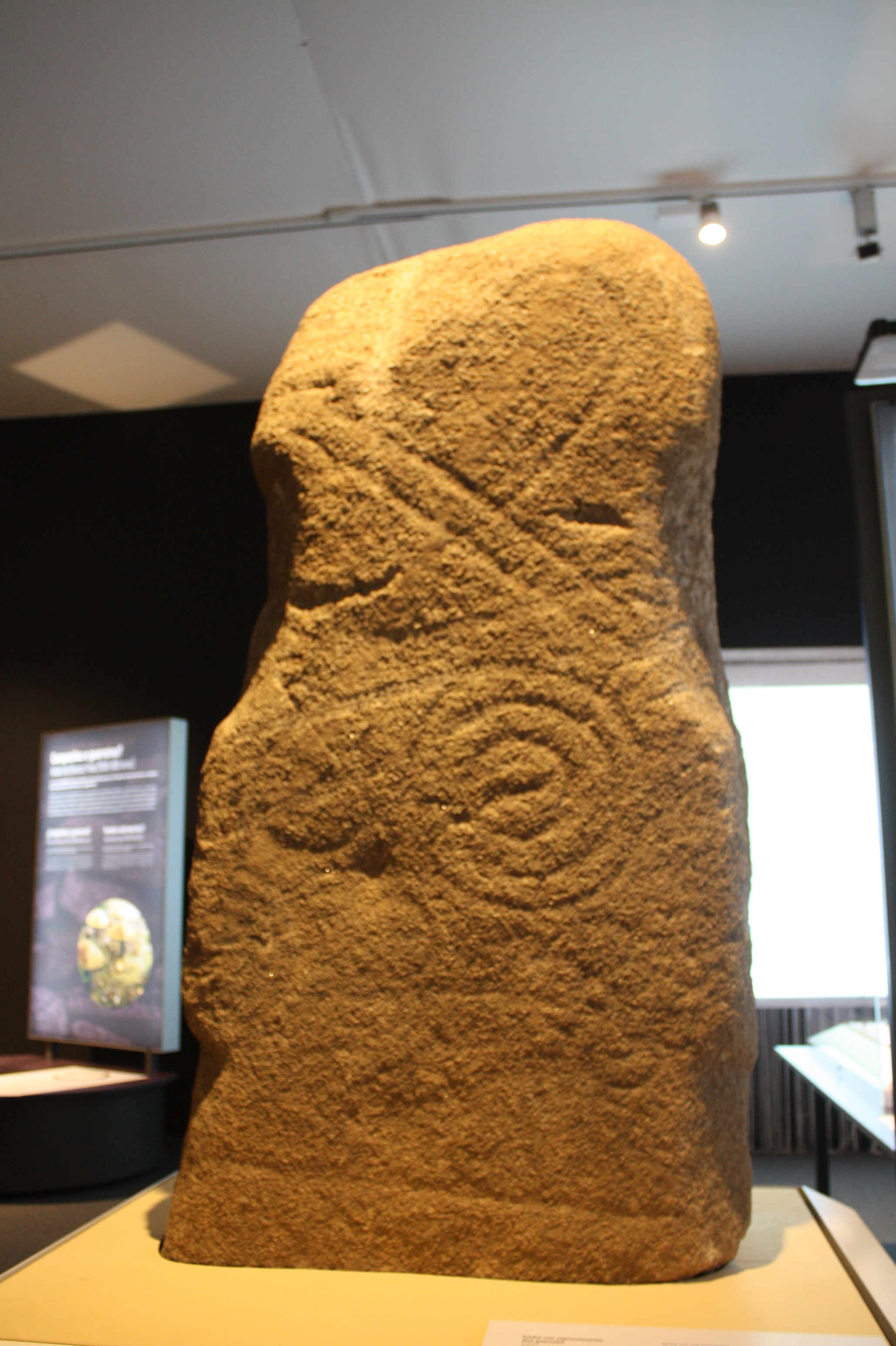 Estela de Castrelo de Val (Ourense), conservada no Museo Arqueolócico Provincial de Ourense. Corresponde á Idade de Bronce.